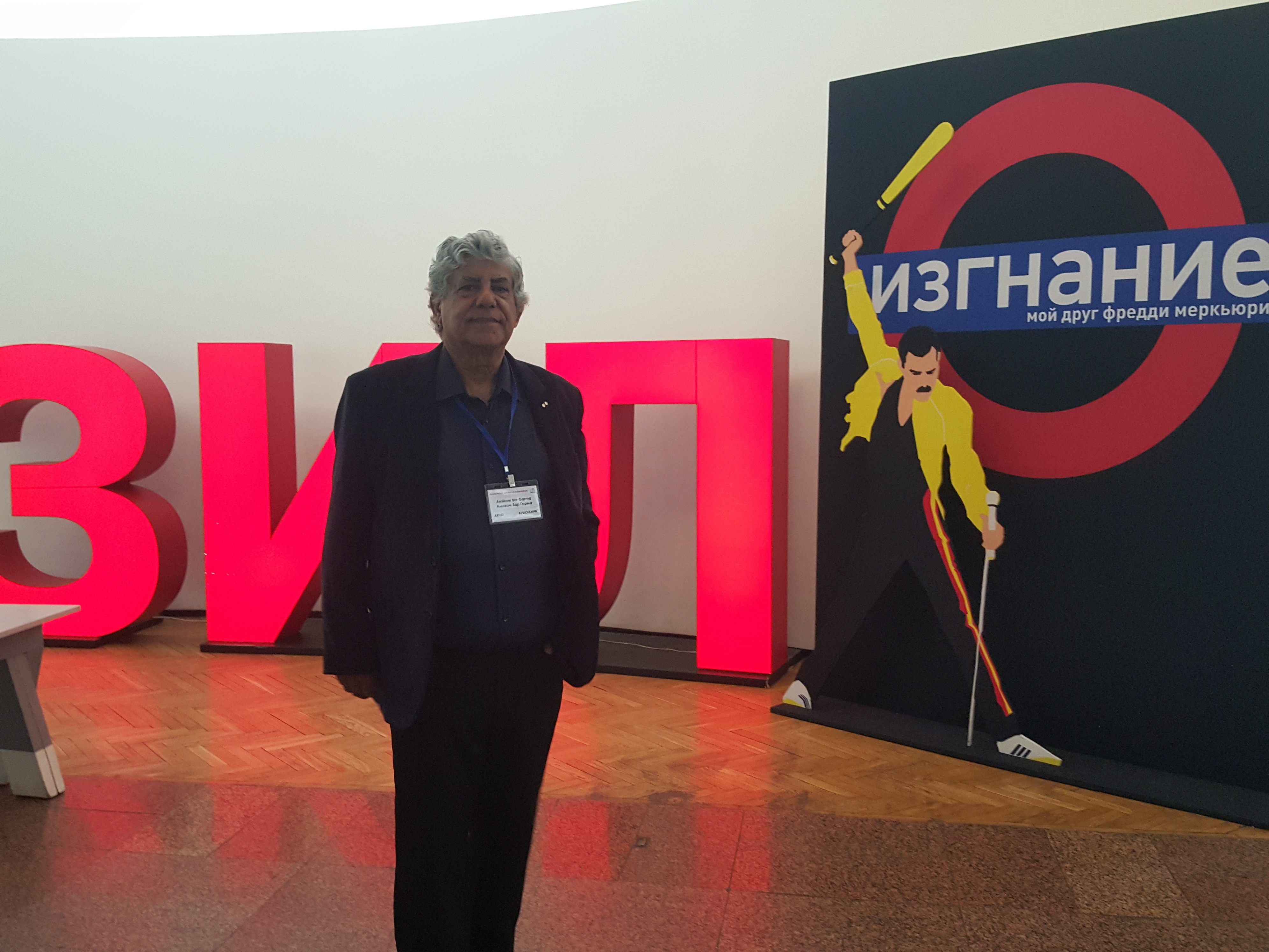 עמיקם בר גרמא בתערוכה במוזיאון המכוניות זיל מוסקבה